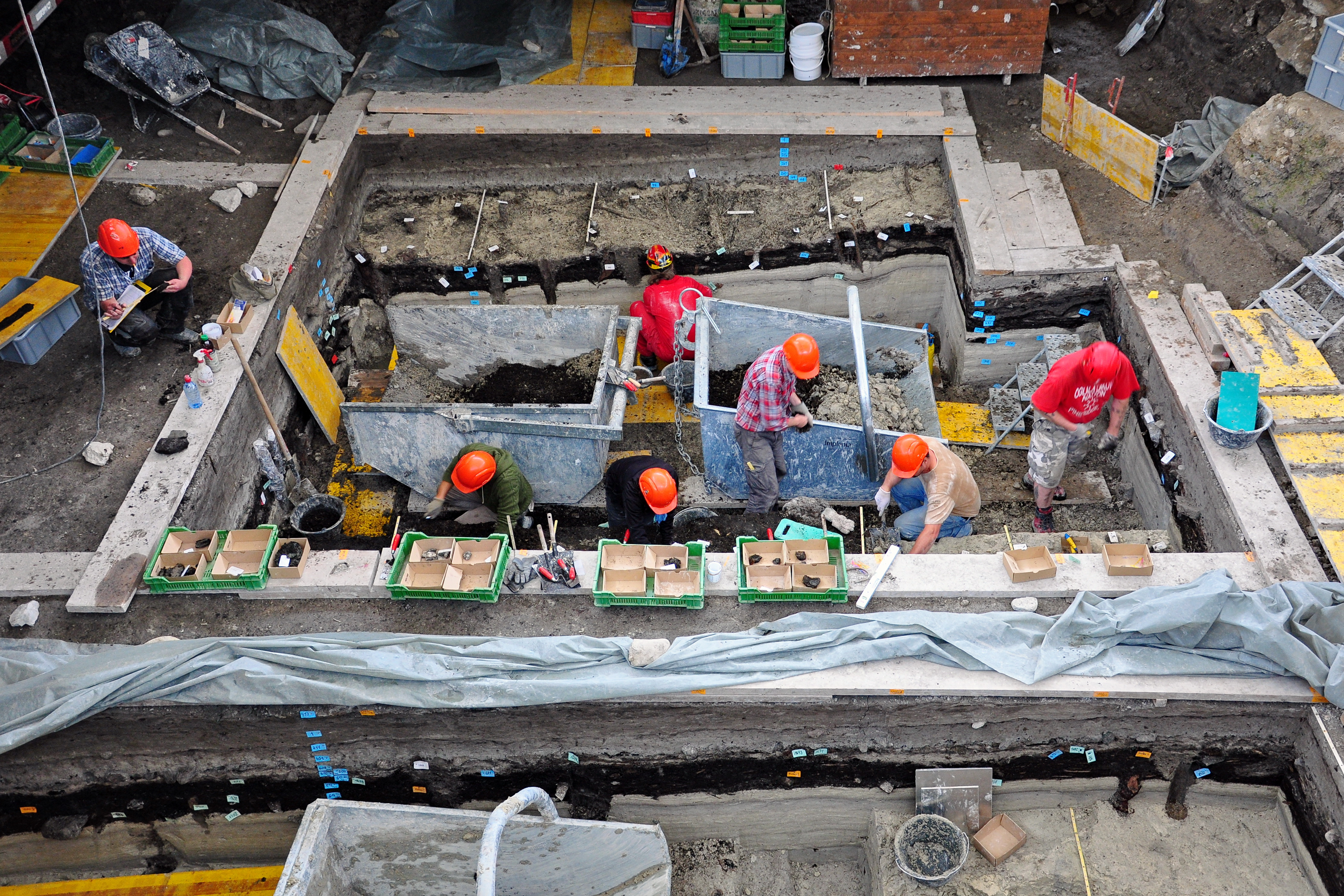 Archäologische Grabung Parkhaus Opéra in Zürich (Switzerland)